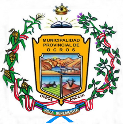 Escudo de Ocros Nombre:Escudo País: Perú Fotógrafo:© Edgar Amador Espinoza Montesinos